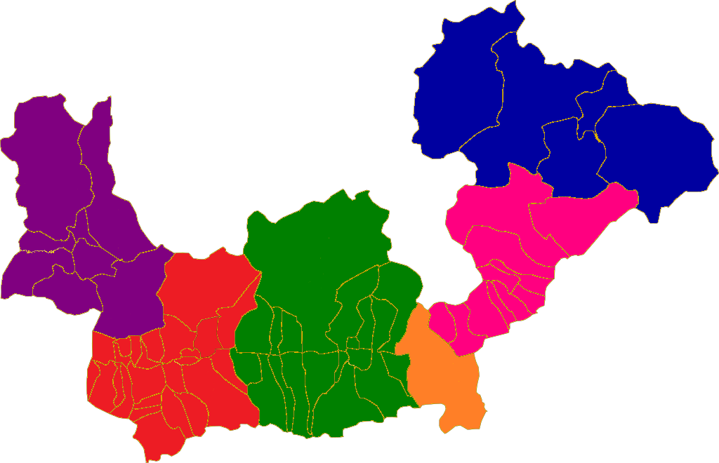 Lumbaart: I division storegh de la Valtolina e de la Val Ciavenna fina a la fin de l'Ancien Régime.